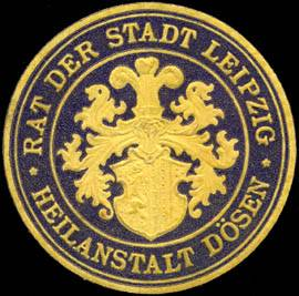 Sealing stamp Title: Rat der Stadt Leipzig - Heilanstalt Dösen Description: dunkelblau, gelb, geprägt Place: Dösen size: 4 cm